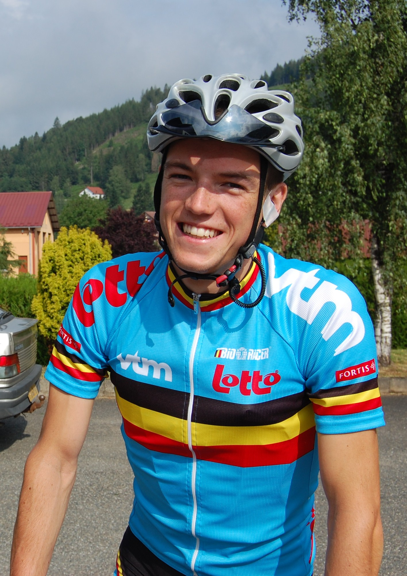 Emiel Wastyn als junior bij de nationale selectie.